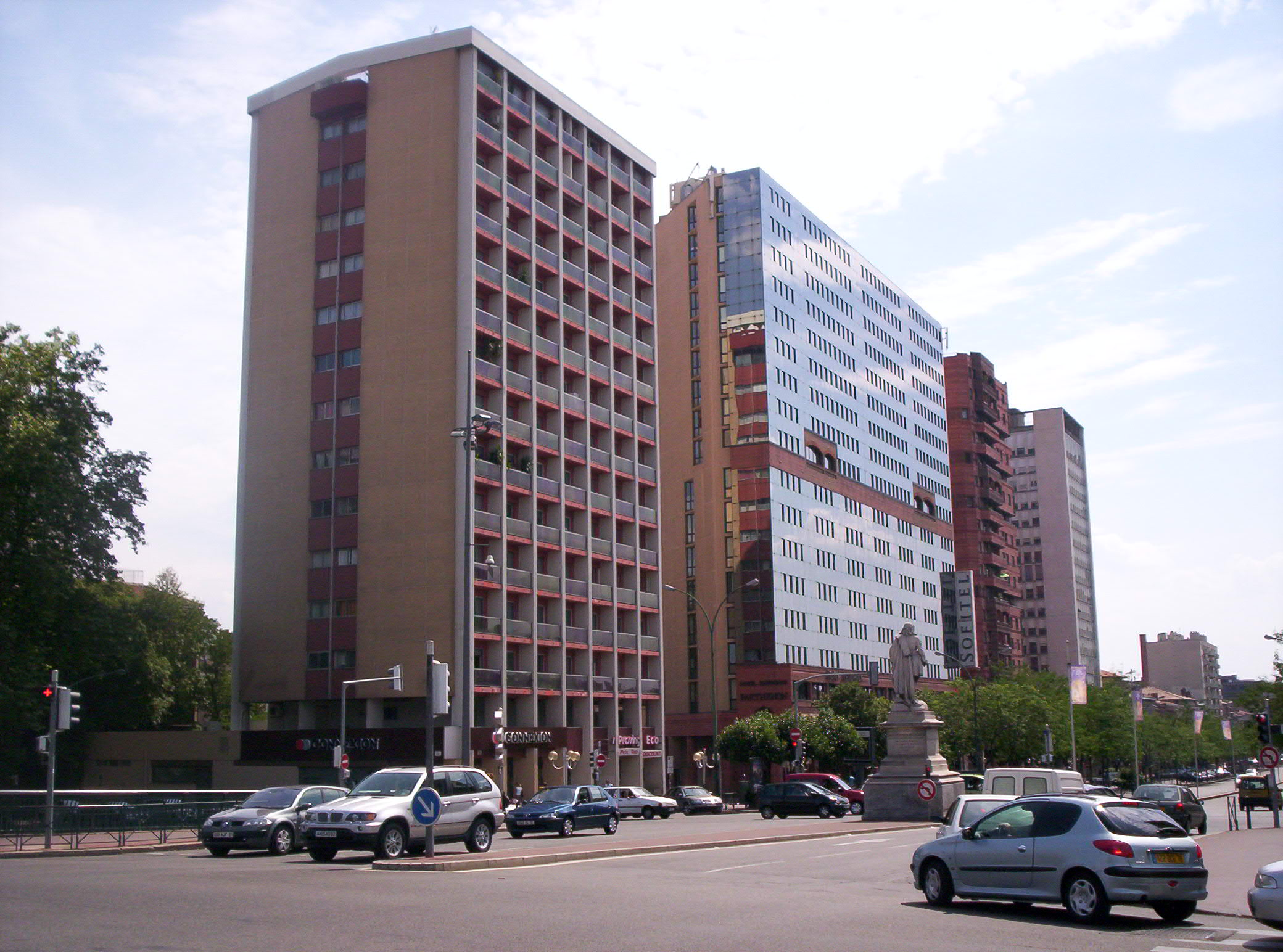 Immeubles de grande hauteur et ancien hôtel Sofitel à Toulouse, allées Jean Jaurès, près de la Gare Matabiau.